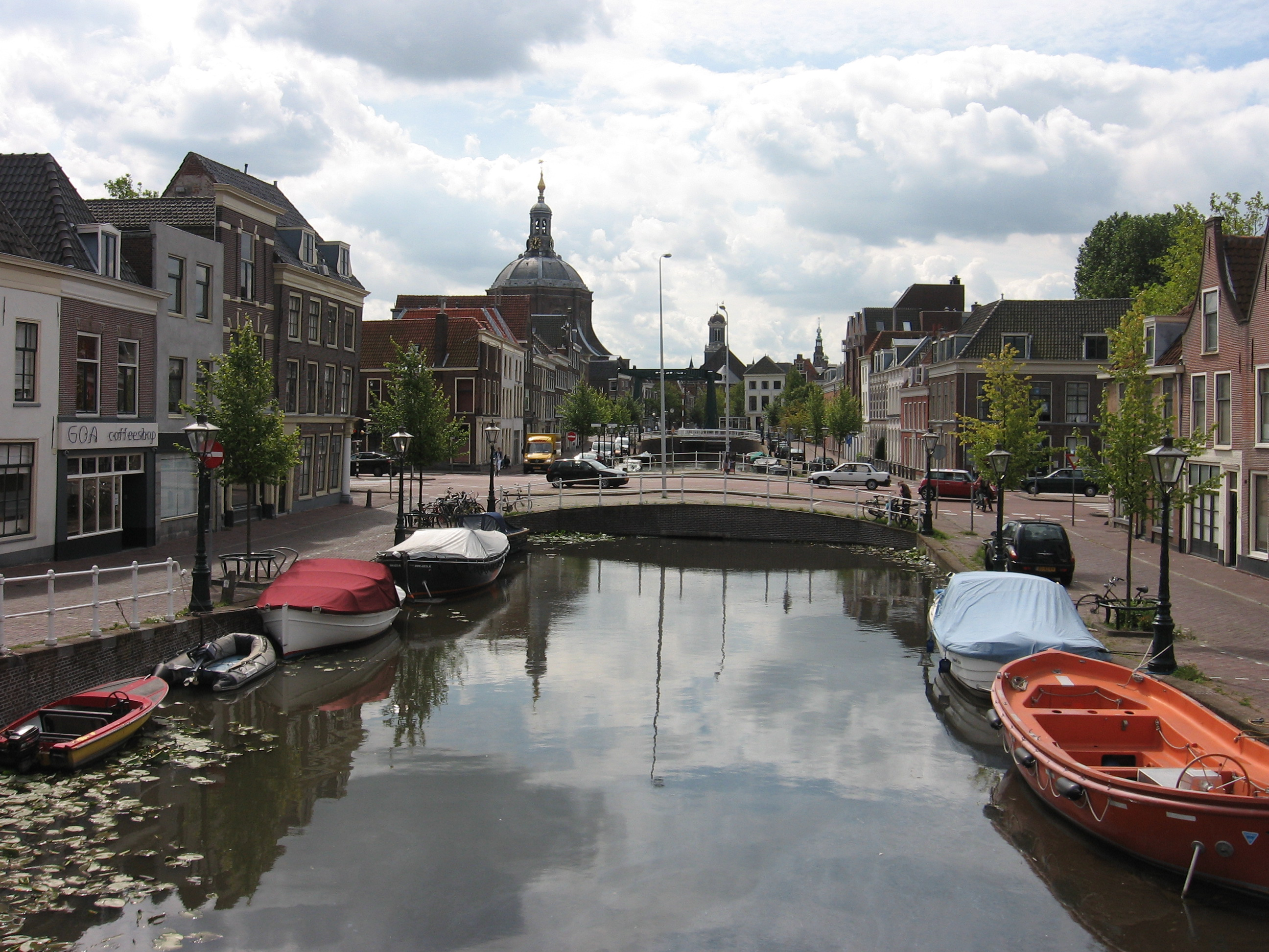 Overzicht Korte Mare naar Marekerk